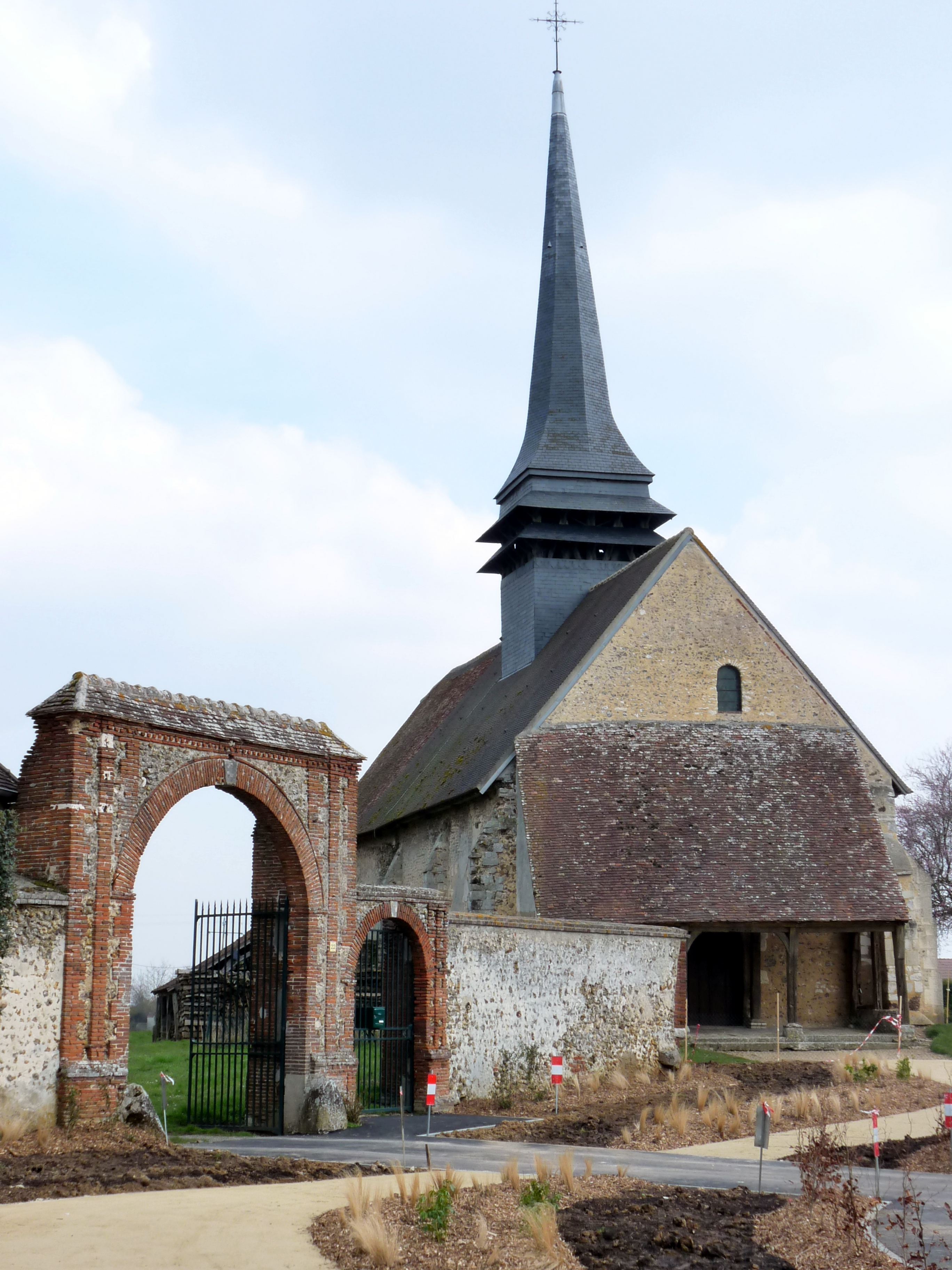 Église Saint-Martin de Coudres